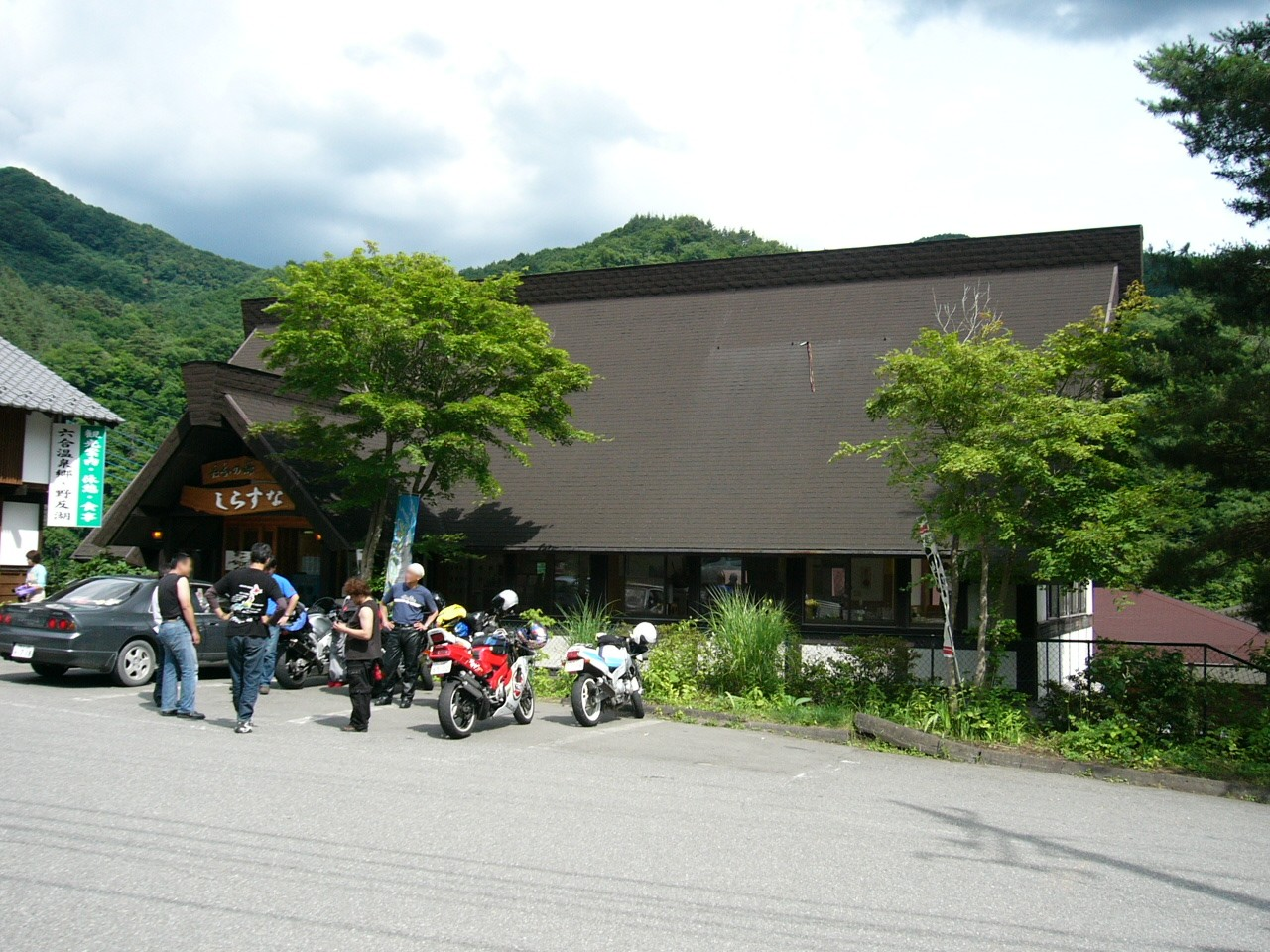 Michinoeki Kuni (Gunma) (道の駅六合)